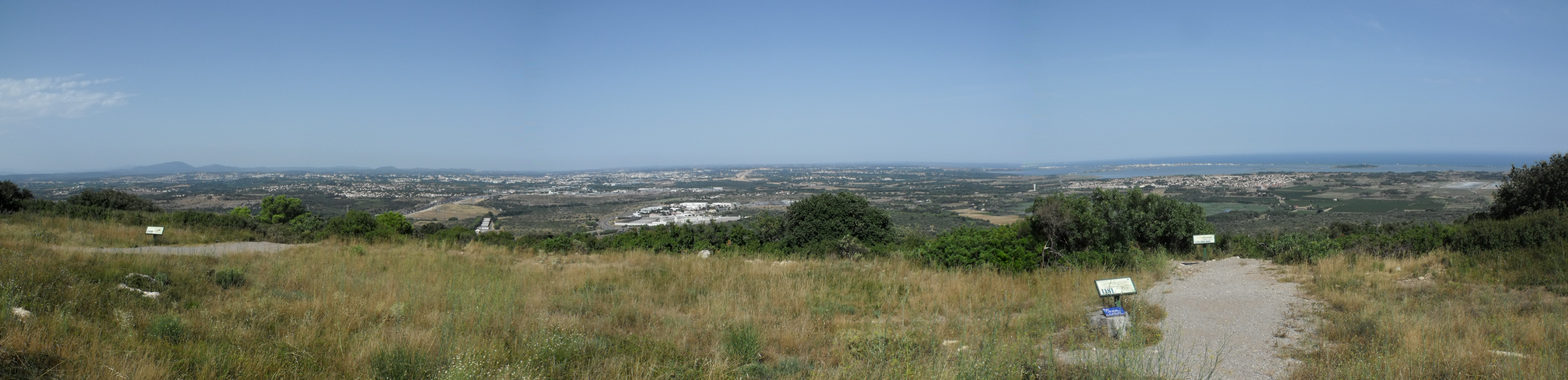 Panorama depuis l'ermitage Saint Baudille, sur la montagne de la gardiole, Hérault, France